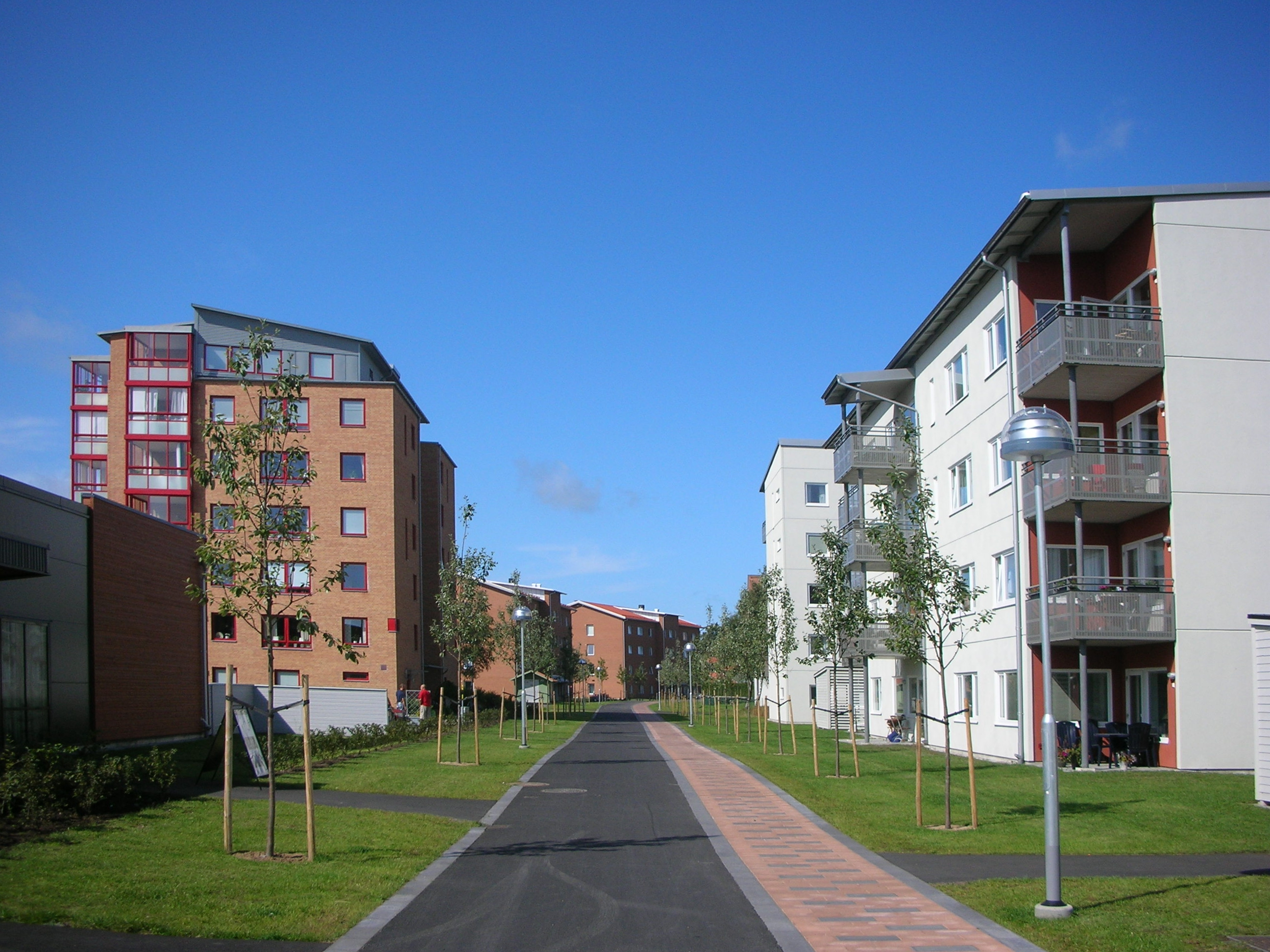 Bostadsområdet Breared i Varberg.